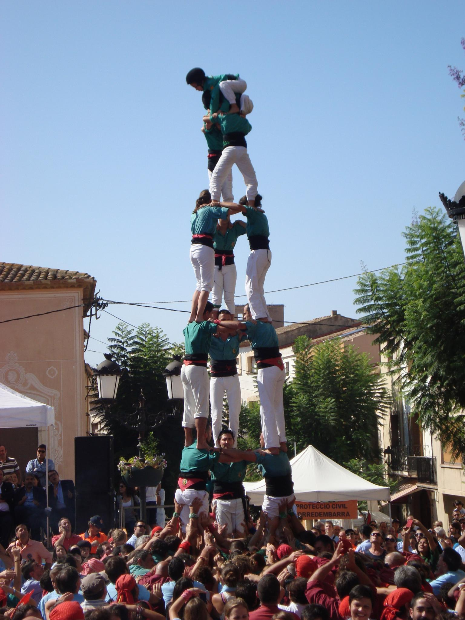 3 de 7 al Concur7 2011, fet probablement per la Colla Jove de l'Hospitalet, a Torredembarra